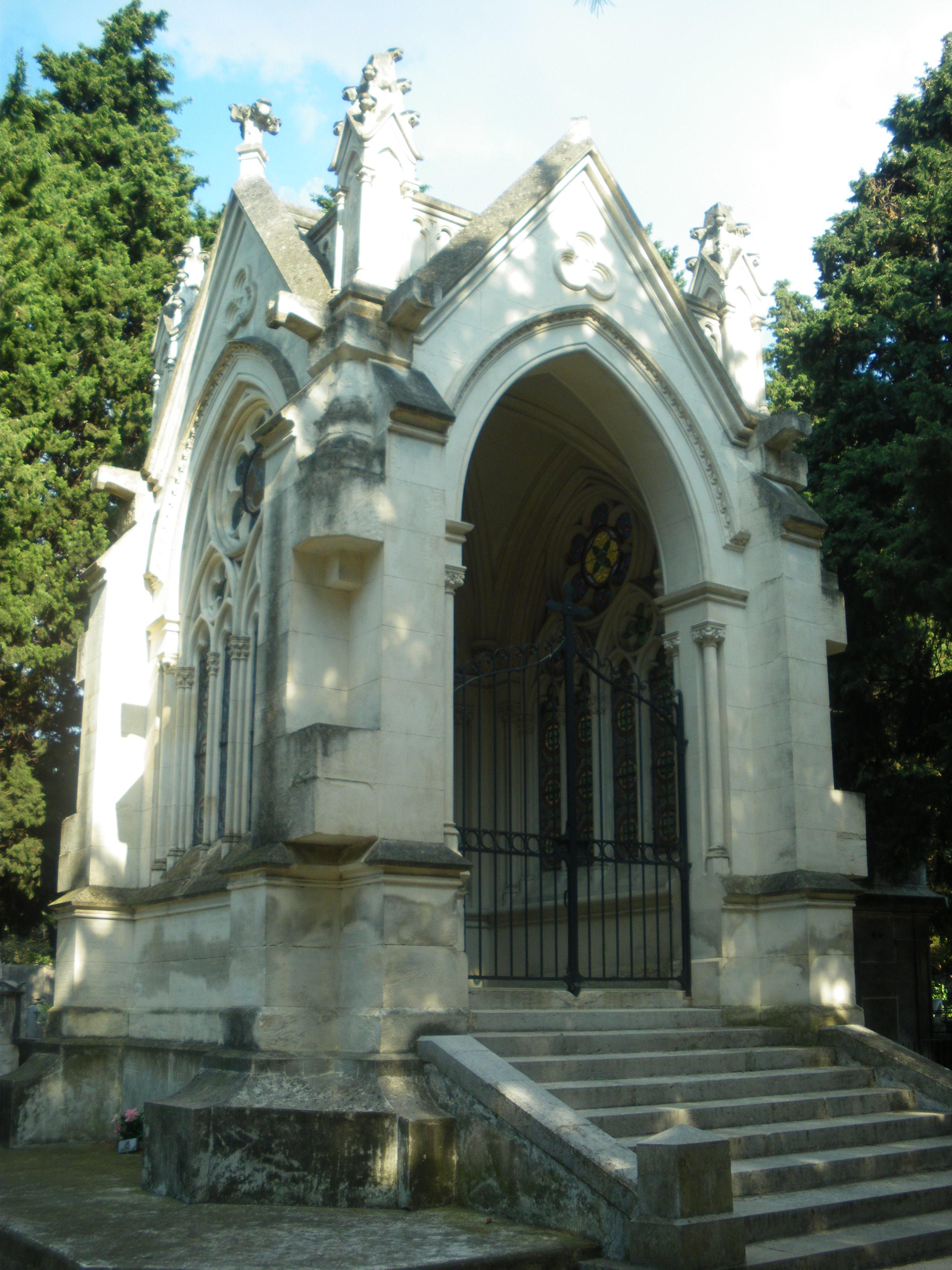 Chapelle et tombeau des Prêtres, Cimetière de Saint Véran, Avignon